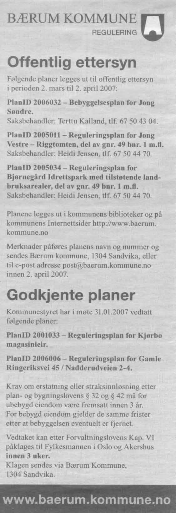 Annonse i "Aftenposten" i forbindelse med reguleringsplaner i Bærum kommune. Scannet 2007-03-03